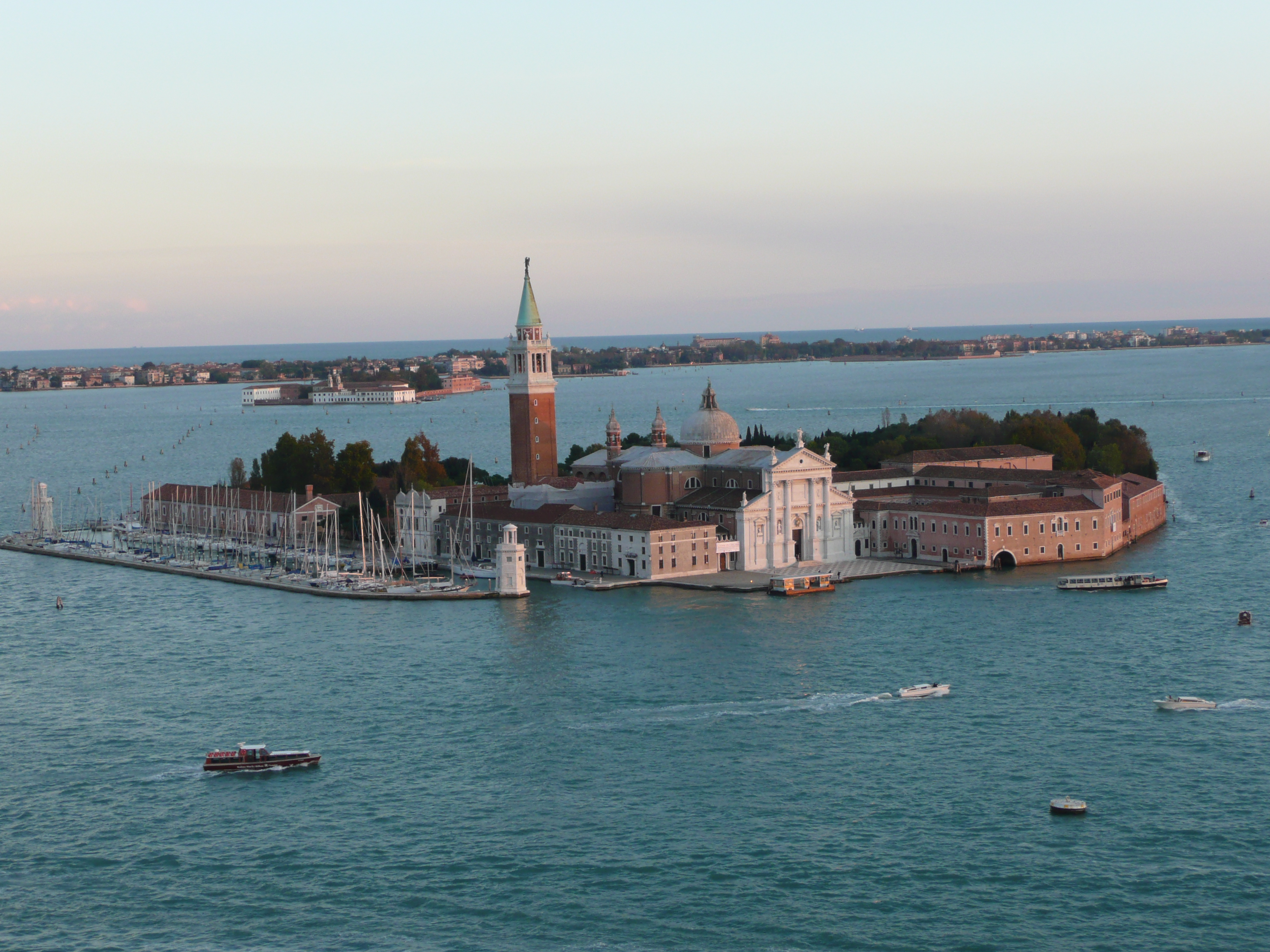 L'île de San Giorgio Maggiore vue depuis le haut du campanile de la place Saint Marc.